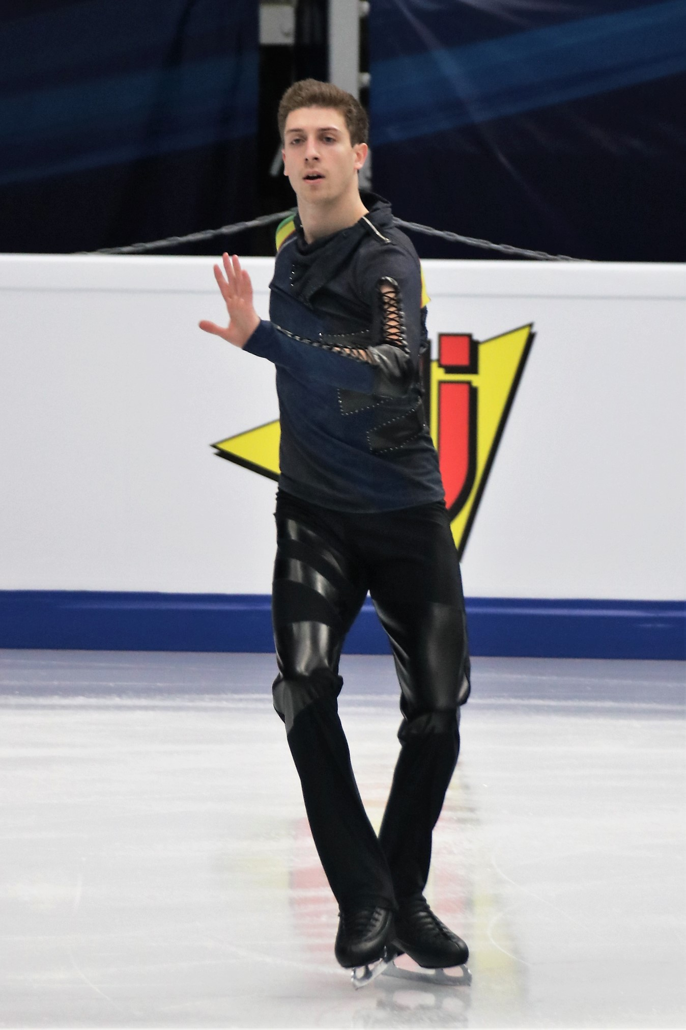 Морис Квителашвили (Грузия) на Чемпионате Европы по фигурному катанию 2018.